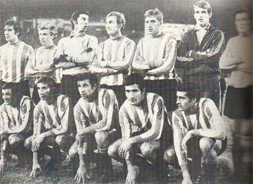 Estudiantes de La Plata, tricampeón de la Copa Libertadores de América, 1970. Arriba: Pachamé, Malbernat, Errea, Pagnanini, Néstor Togneri, Oscar Pezzano y Jorge Solari; abajo: Conigliaro, Bilardo, Eduardo Flores, Juan Ramón Verón y Spadaro.